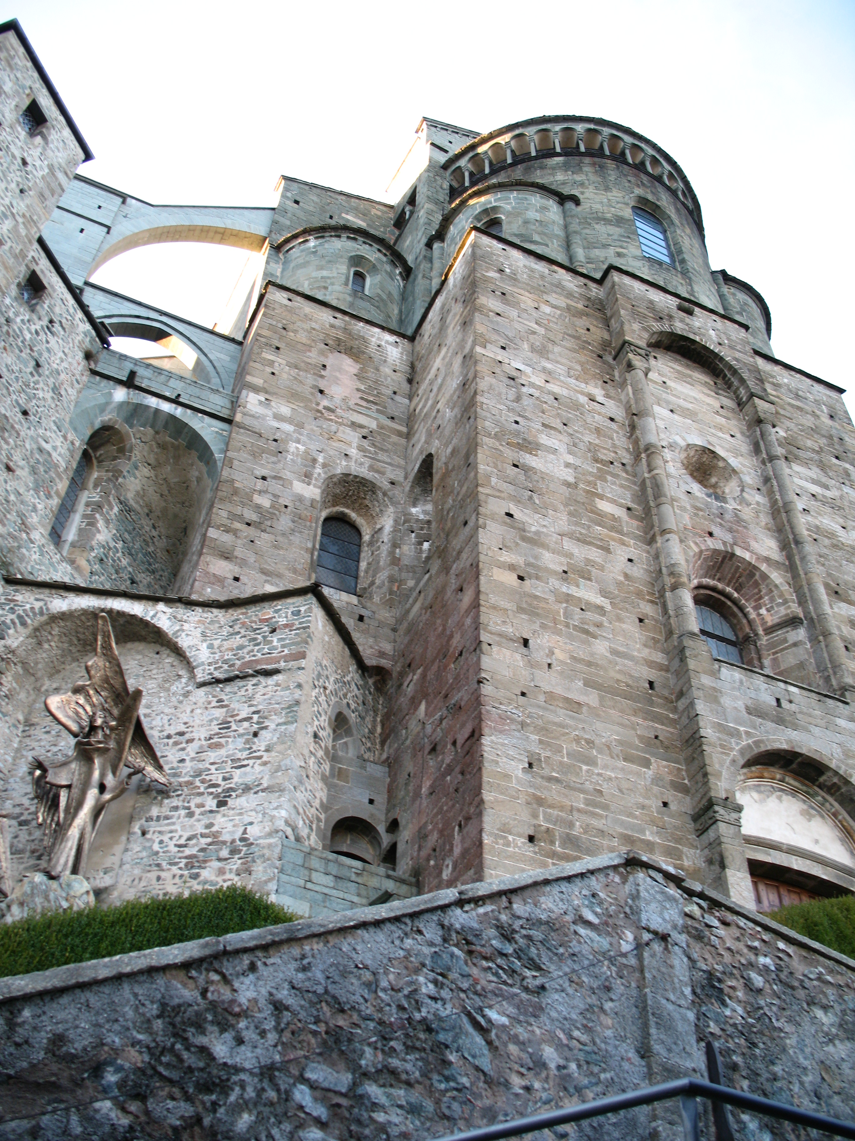 Sacra di San Michele, corpo centrale - Valle di Susa